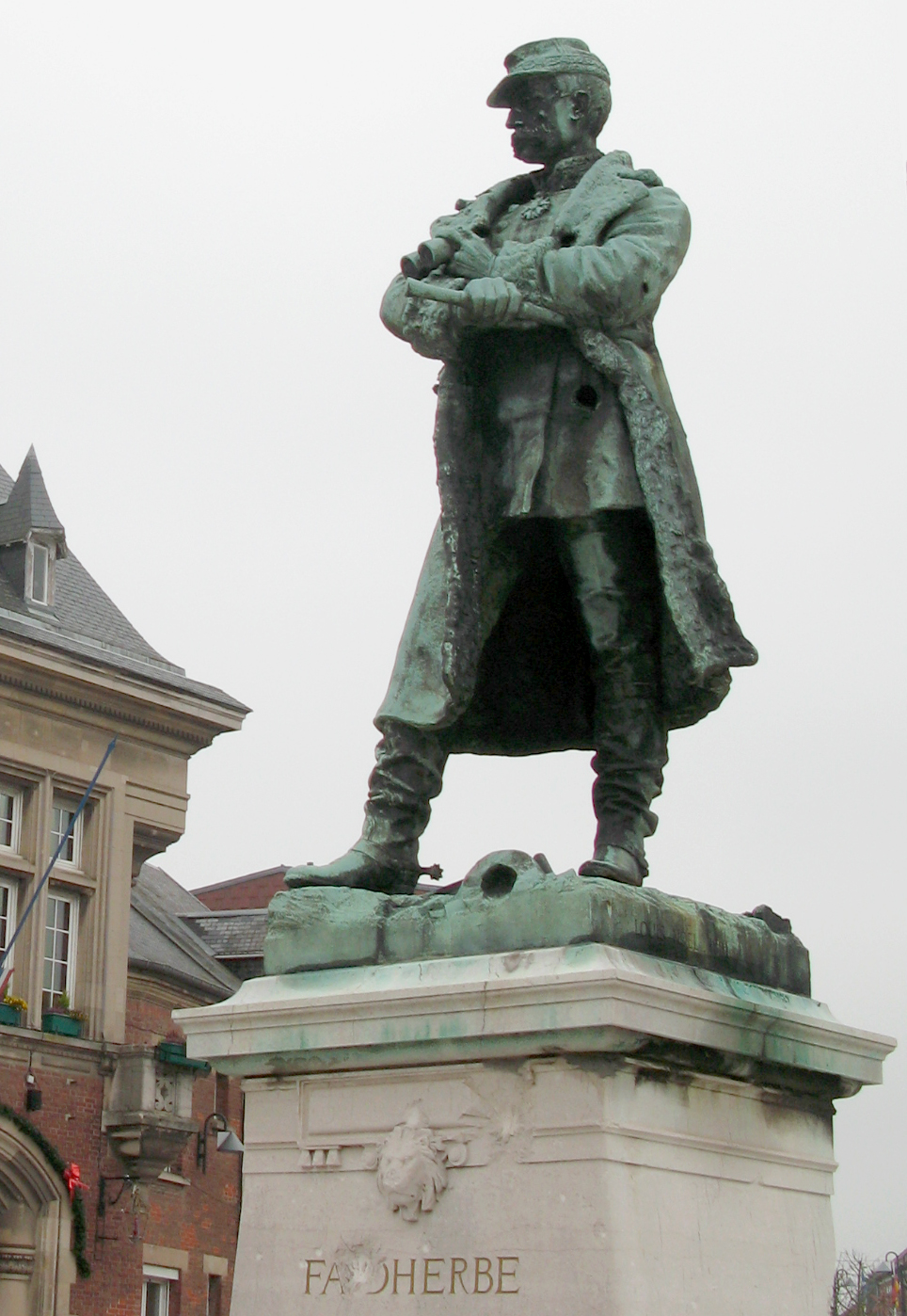 Bapaume (Pas-de-Calais, France) - La statue de Faidherbe sur la place de l'hôtel-de-ville. .